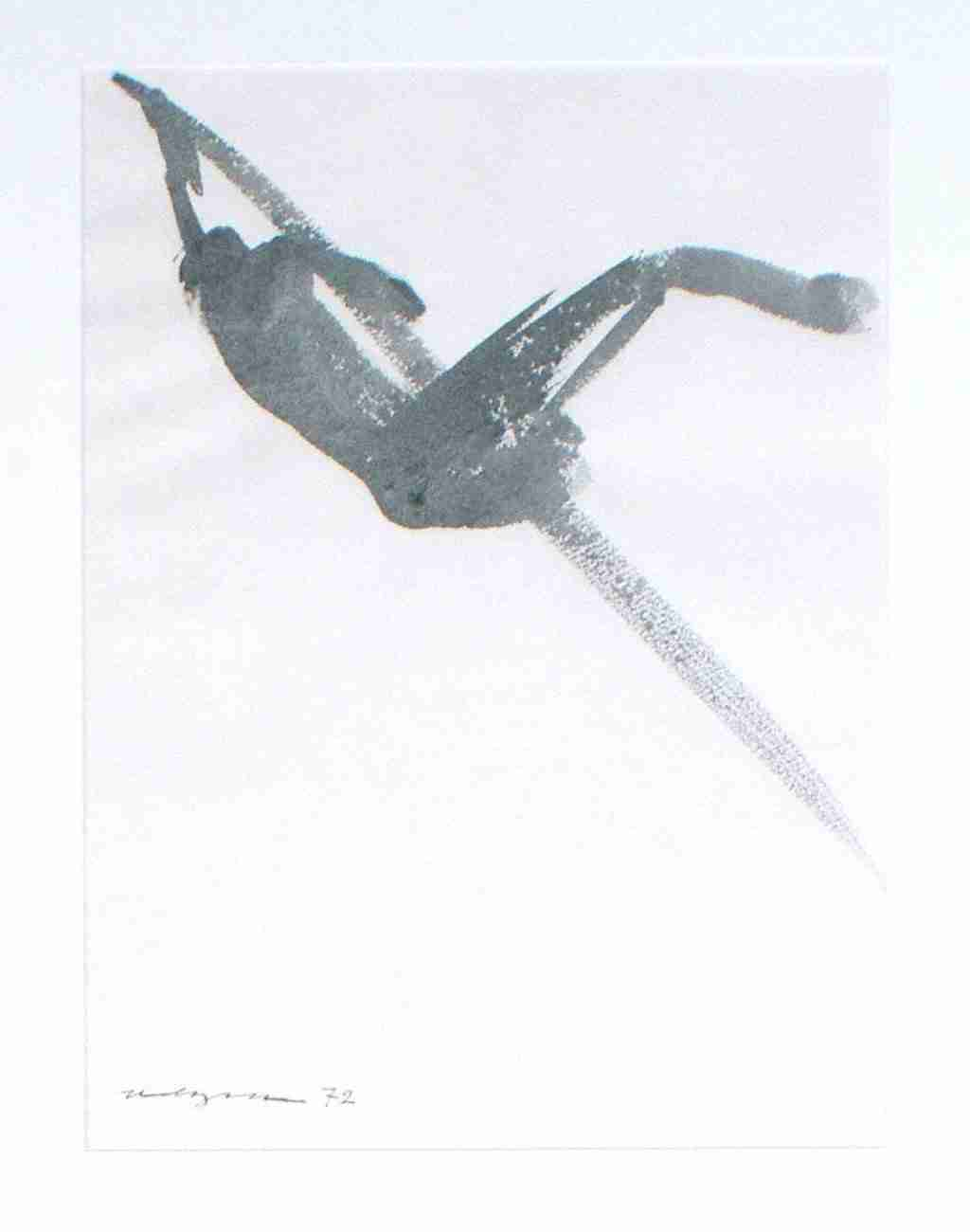 Zeichnung Stabhochspringer 1972